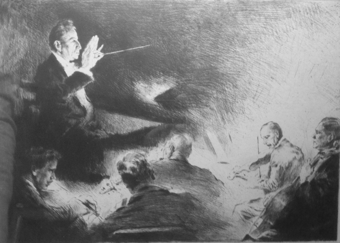 Komponist Leo Blech mit den Streichquartett in Dortmund um 1925 Radierung von Moritz Coschell